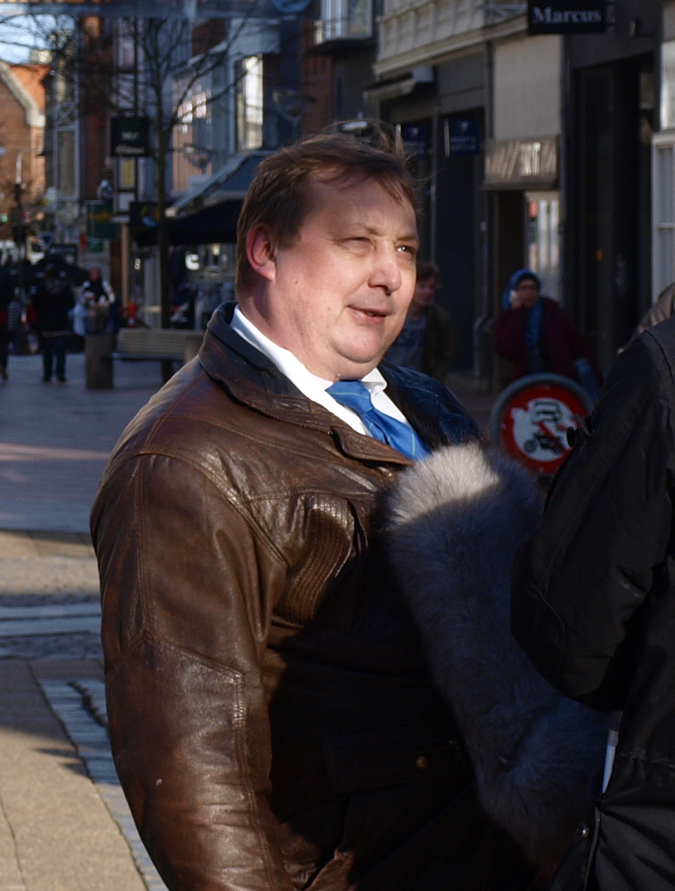 Anders Gravers Pedersen til demonstration i Kolding den 13. april 2015